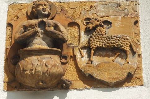 Ellwangen (Jagst), ehemalige Statthalterei, Relief mit dem hl. Vitus und Wappen der von Hausen (1591 erbaut unter Fürstpropst Wolfgang von Hausen; reg. 1584-1603)